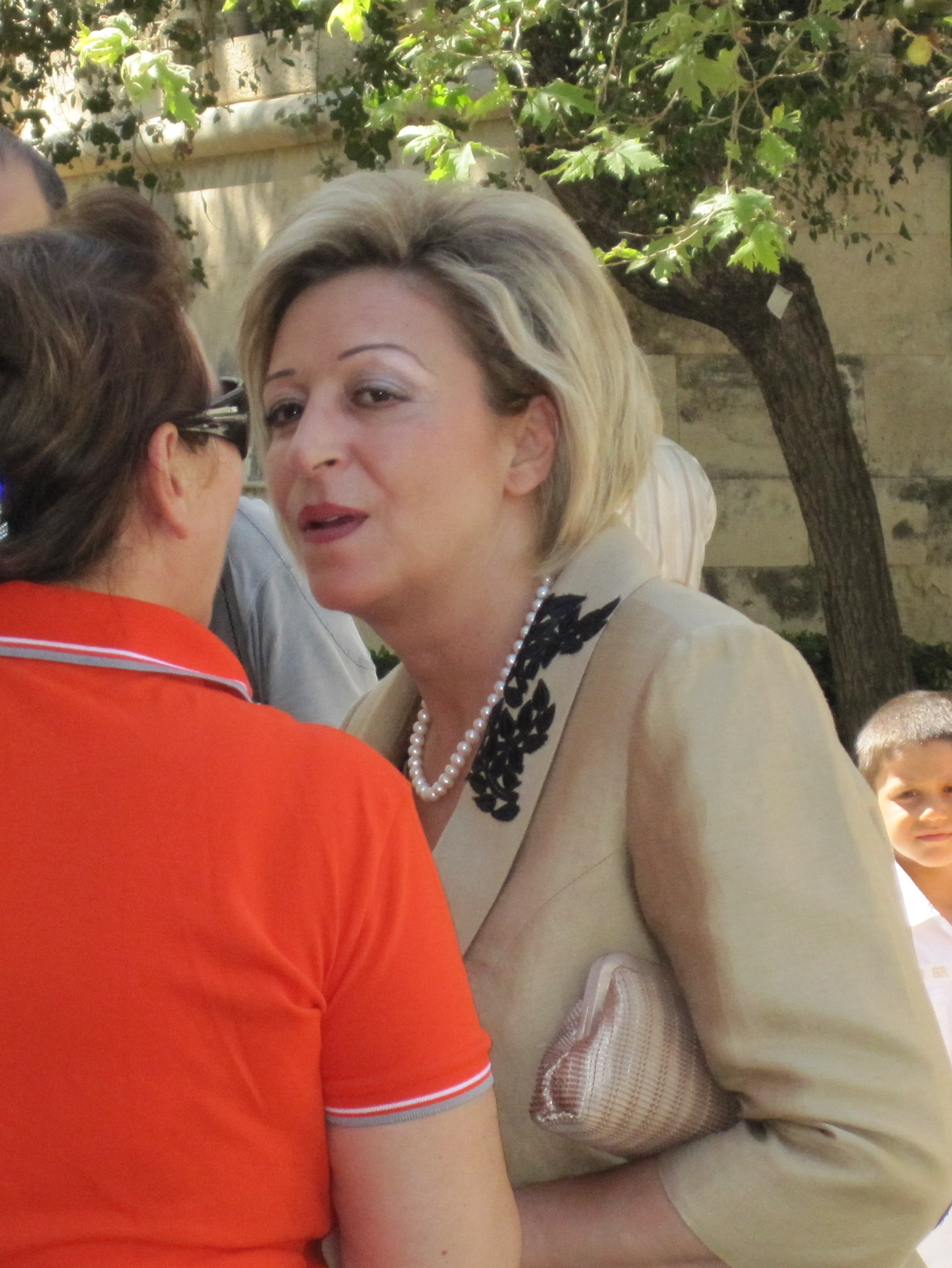 Maria Skrafnaki, Abgeordnete von Iraklio/Kreta